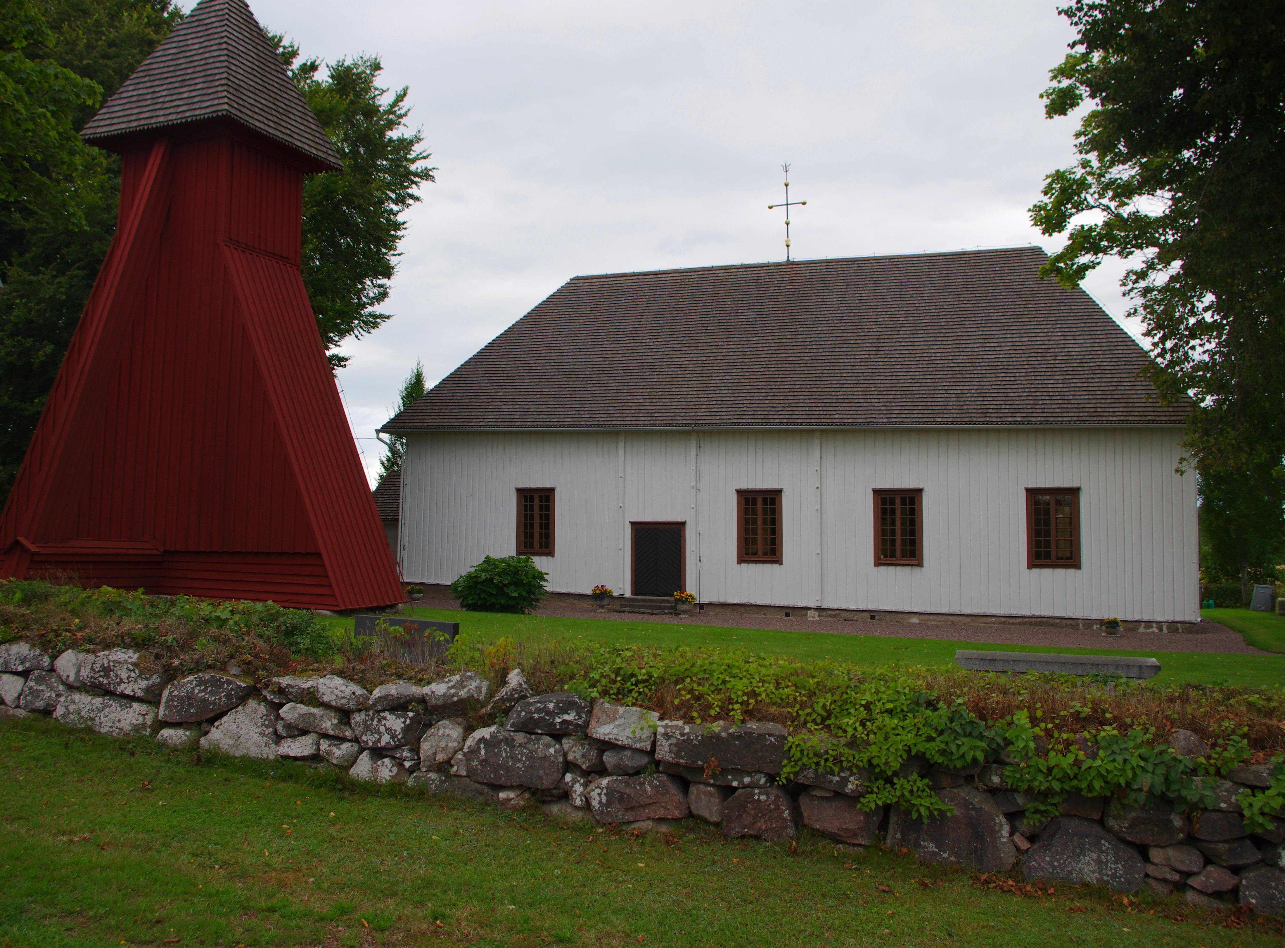 Mofalla kyrka i Västergötland och Hjo kommun i Västragötalands län i Sverige.